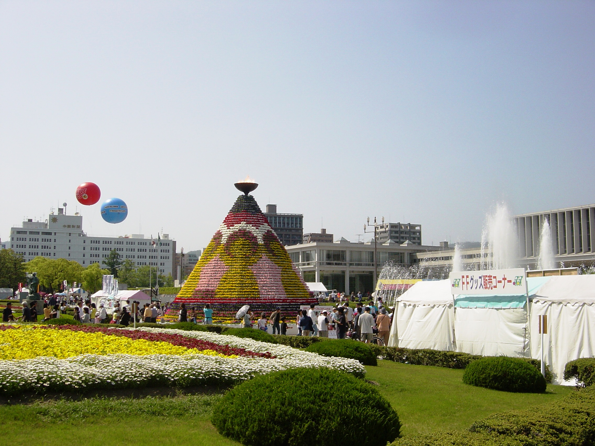 Hiroshima-flower-festival(ひろしまフラワーフェスティバル花の塔)